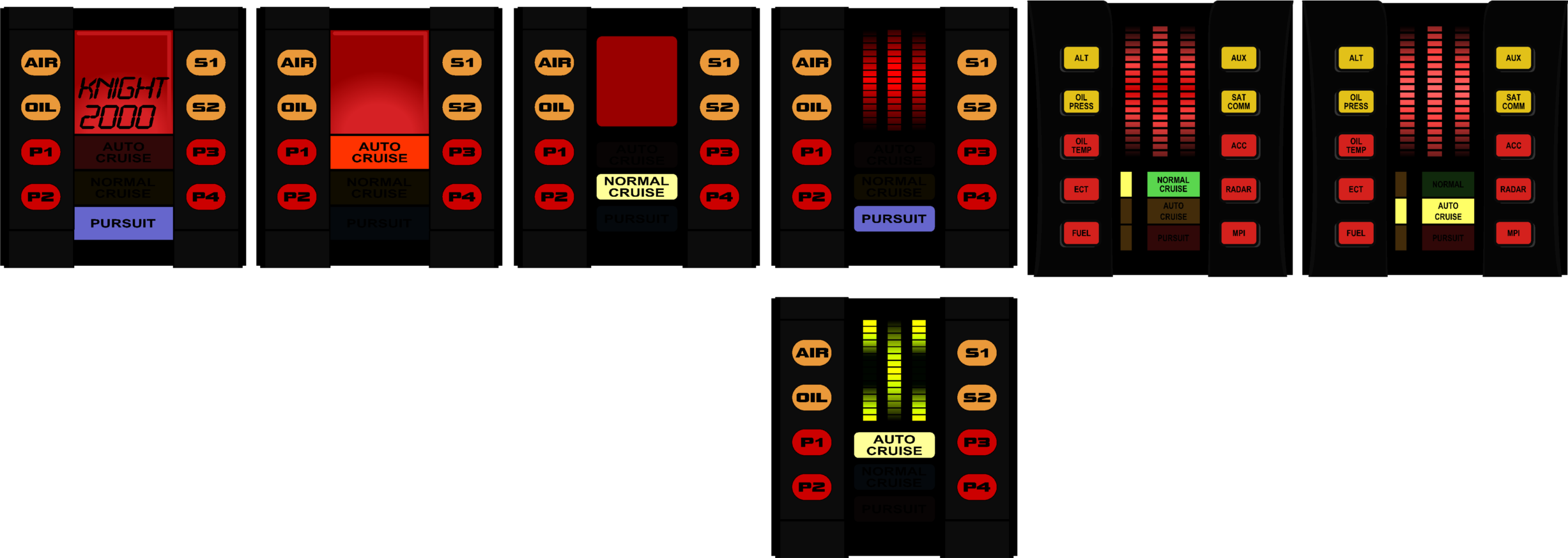 Diferentes moduladores de voz usados por KITT en la serie El coche fantástico.